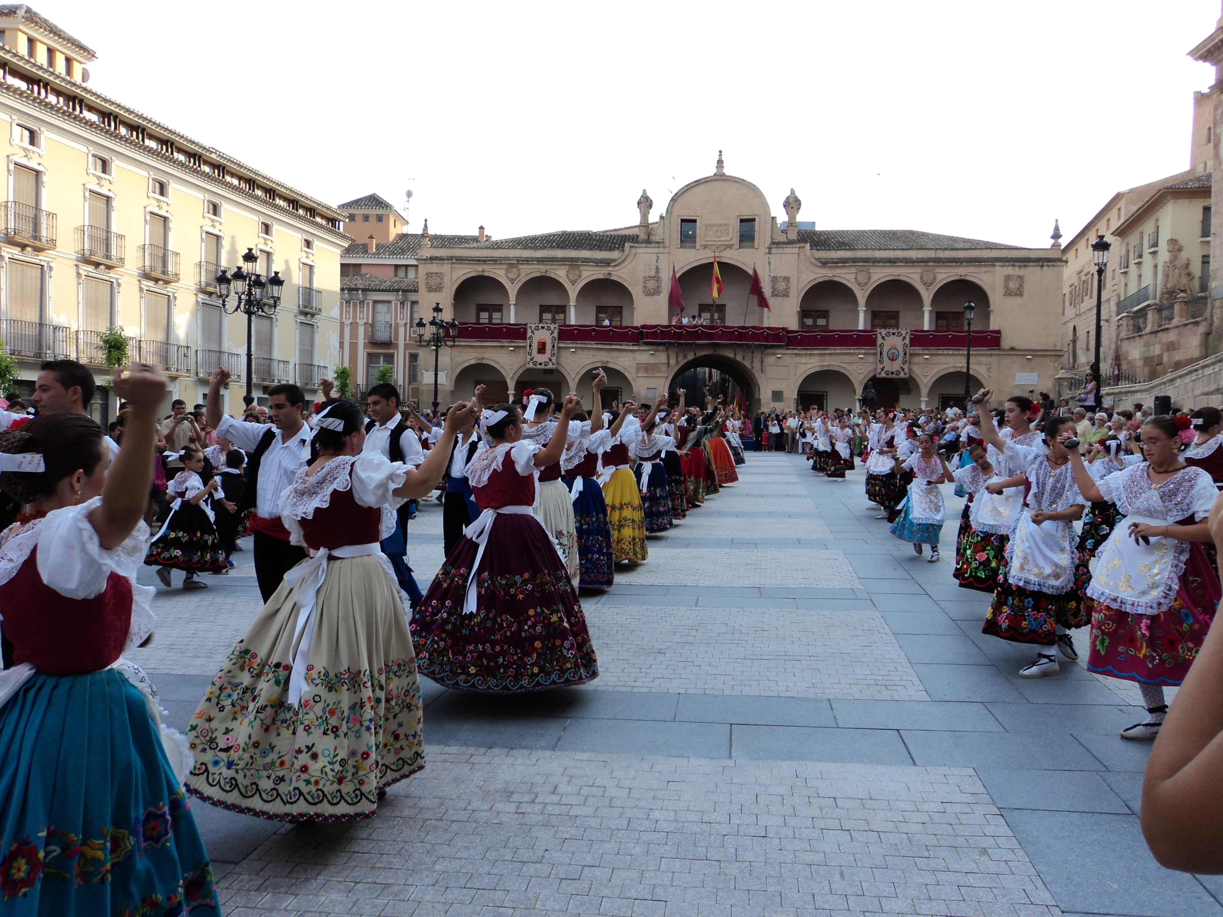 Acto de inauguración de la remodelación de la Plaza de España en Lorca. Al fondo el Ayuntamiento de la ciudad.